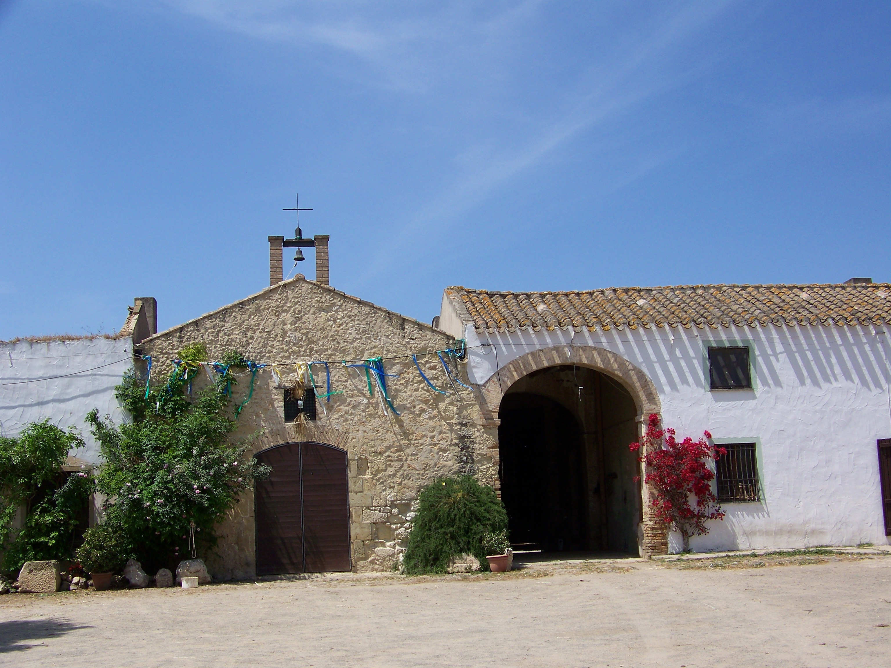 Chiesa di Santa Caterina d’Alessandria, Elmas, Cagliari, Italia